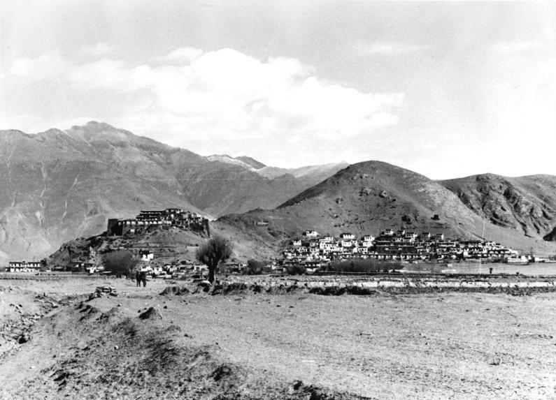 Netong, Jalung-Tal [Yarlung-]